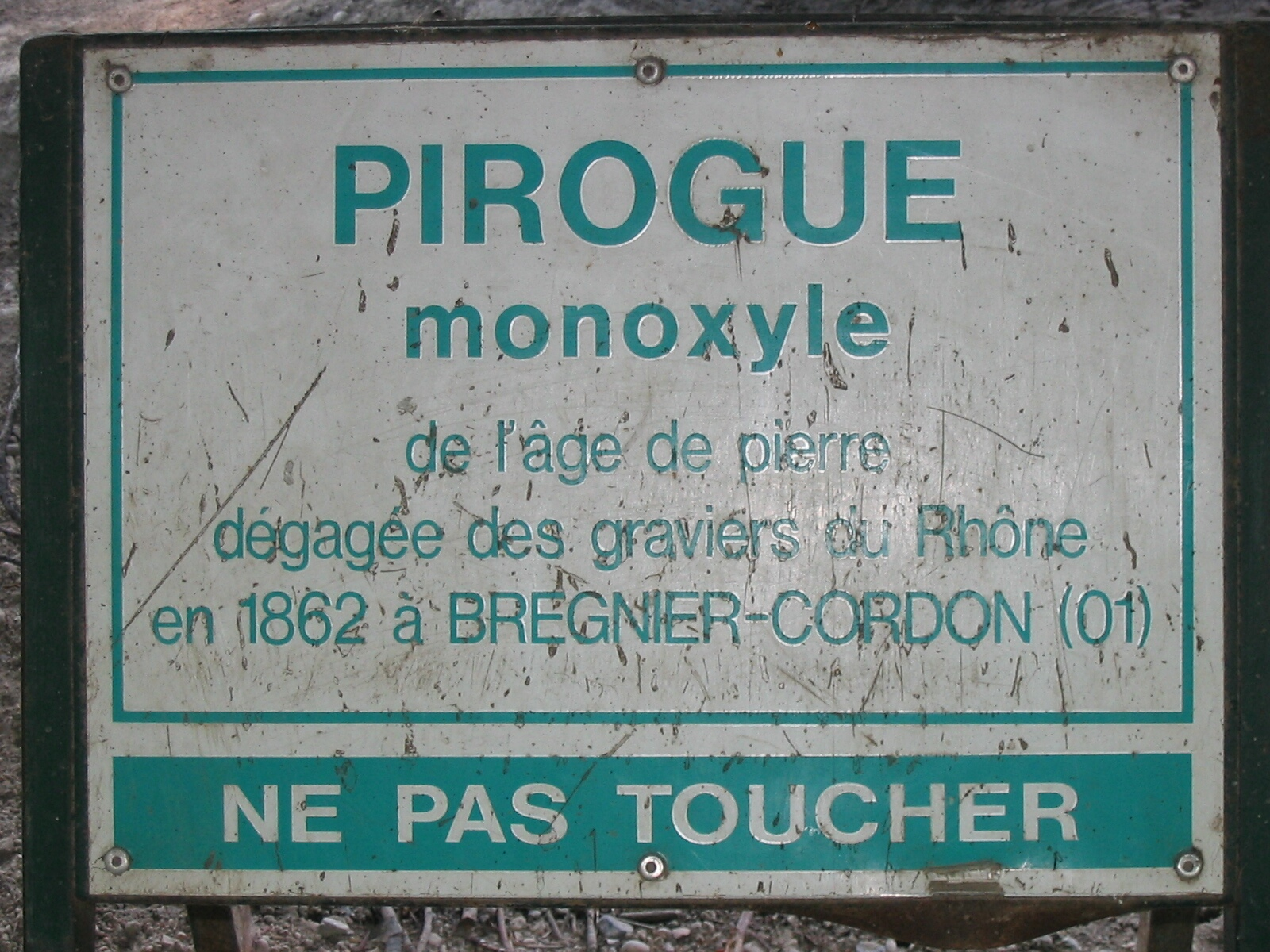 La plaque explicative de la pirogue - Parc de la Tête d'Or (Lyon)